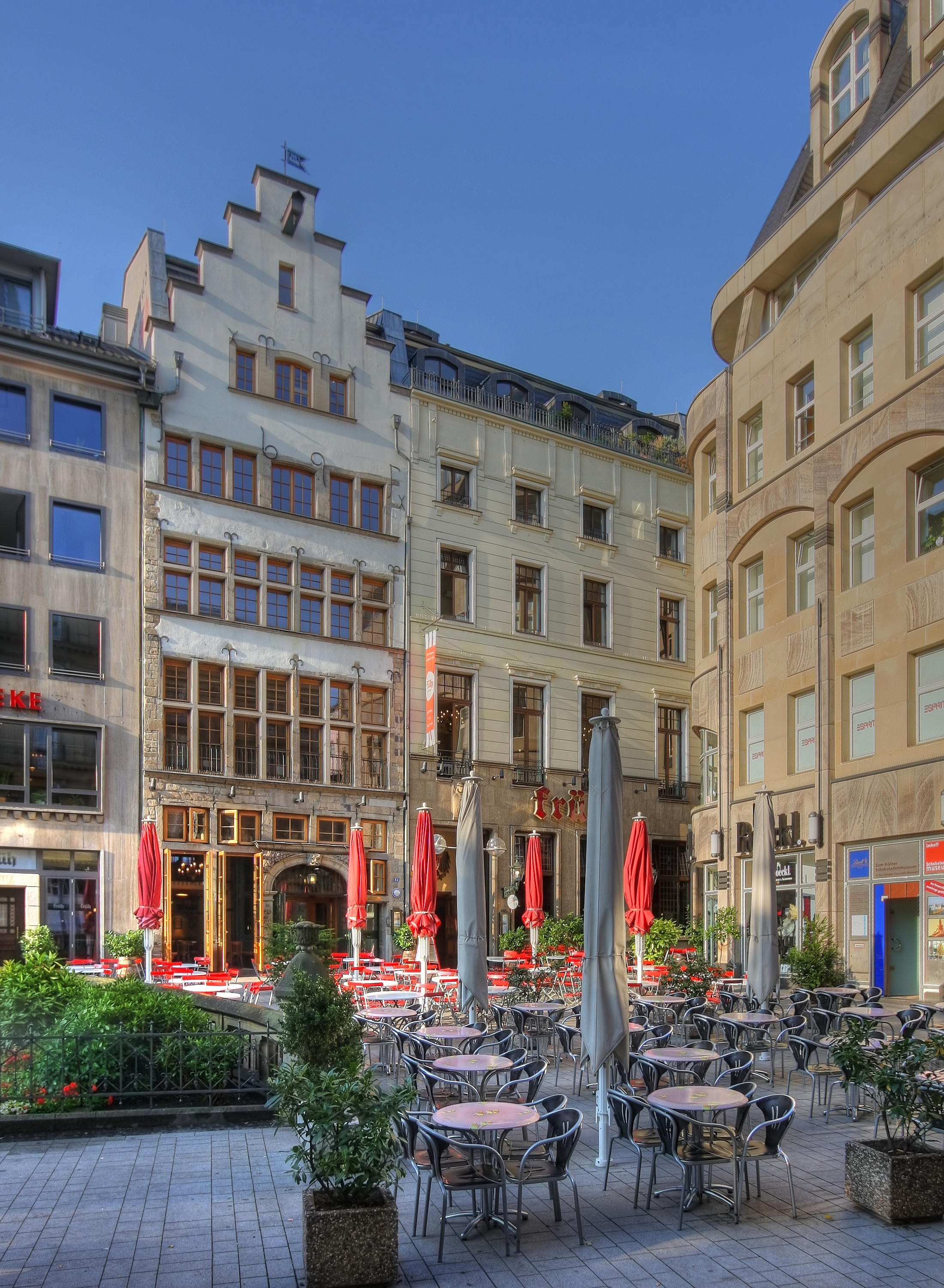 Früh Brauhaus, Am Hof 12 und 14, 50667 Köln